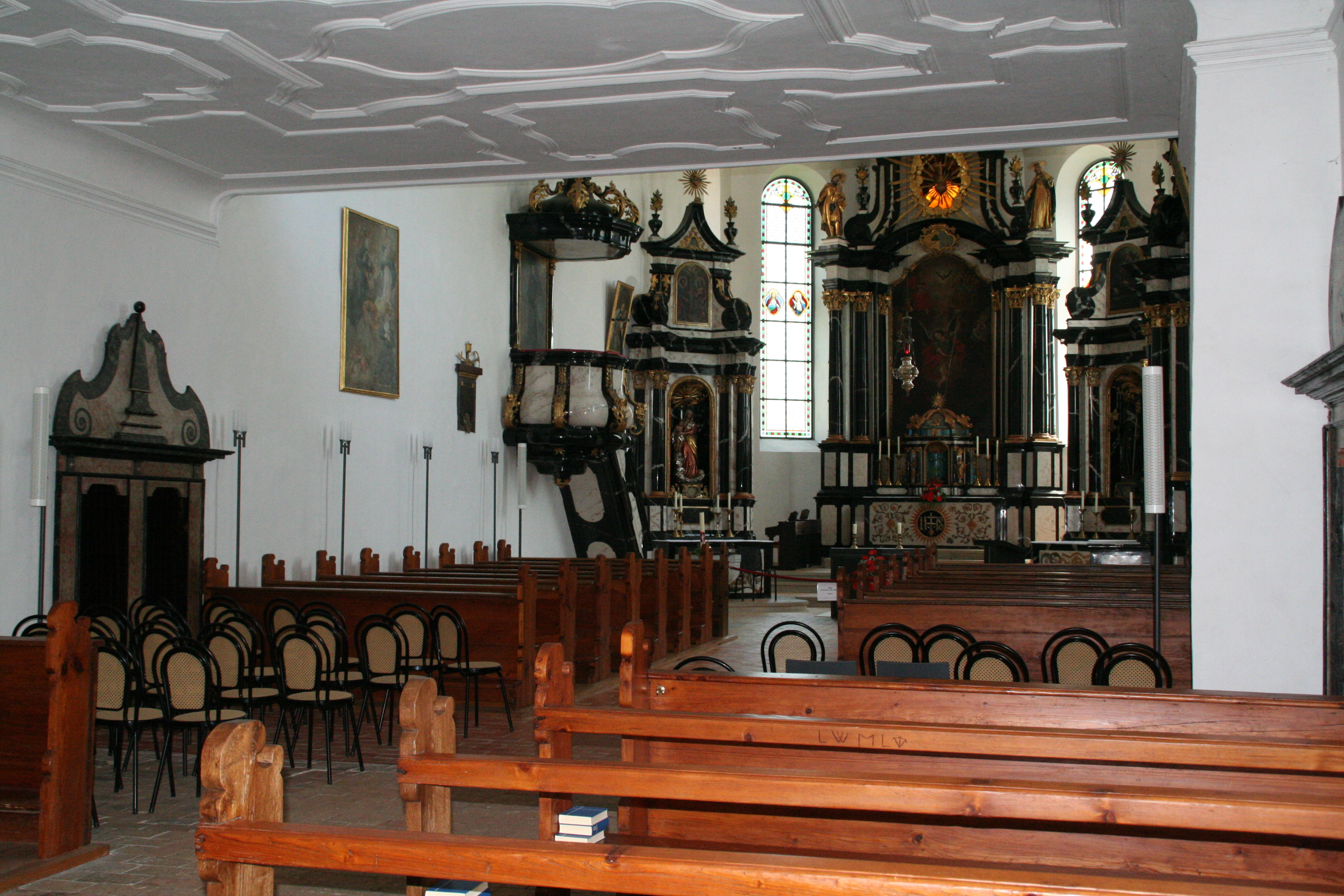 Klostergut Paradies